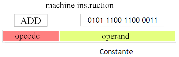 e immédiat